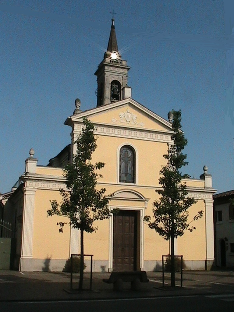 Binanuova (Gabbioneta-Binanuova) - Chiesa parrocchiale dei Santi Martino e Nicola